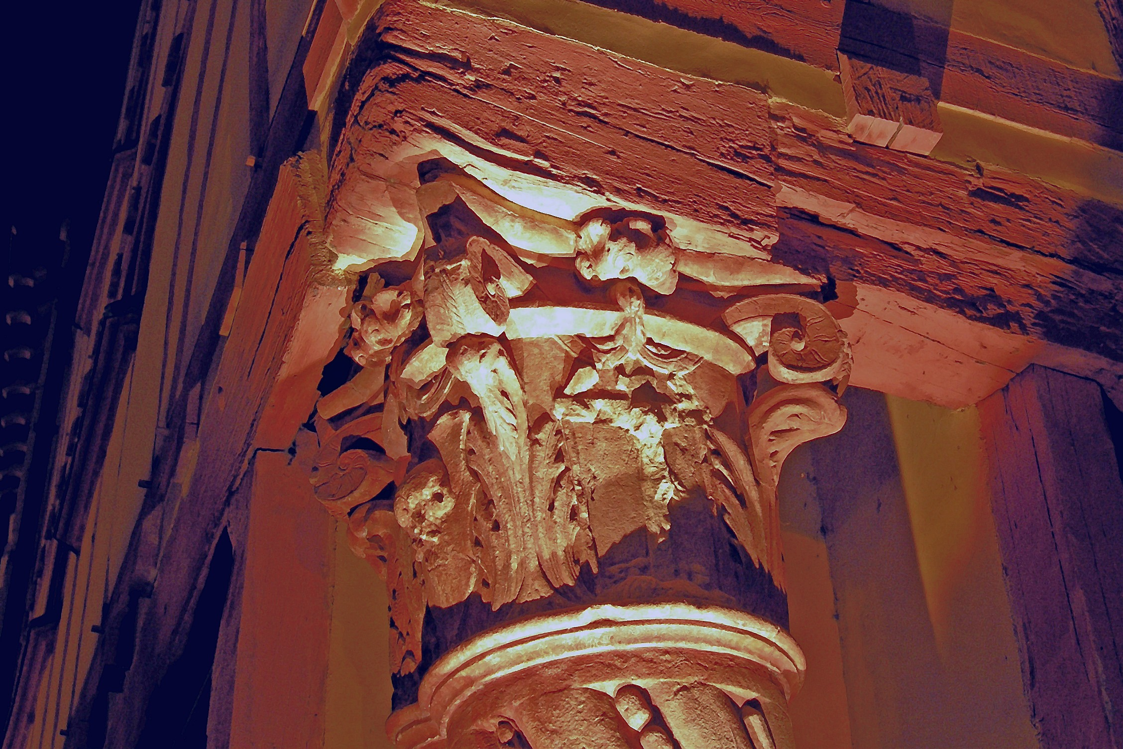 Oeuvre artistique personnelle représentant le pilier rouge dans le vieux Mans. Filtre de couleur bleu et amélioration de la luminosité avec simulation de peinture à l'huile.